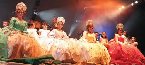 reynas